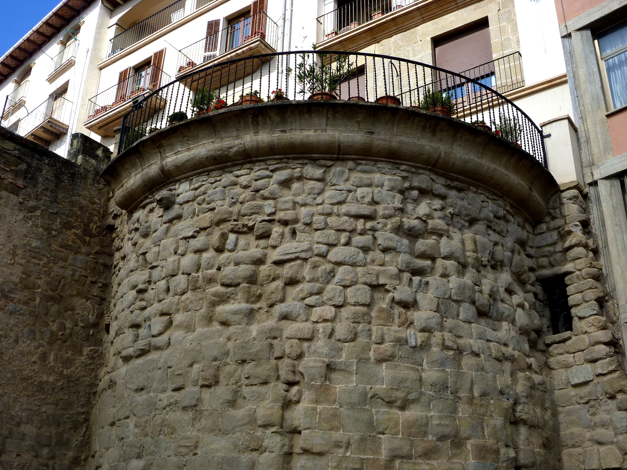 Recinte murat de Solsona: posterior de la casa de cal Galtanegra